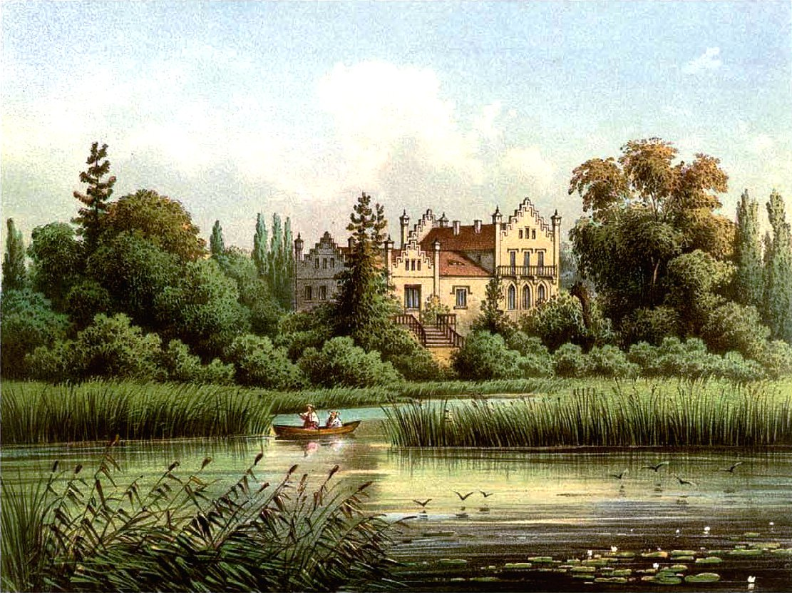 Schloss Charcice, Kreis Birnbaum, Provinz Posen, Lithografie aus dem 19. Jahrhundert